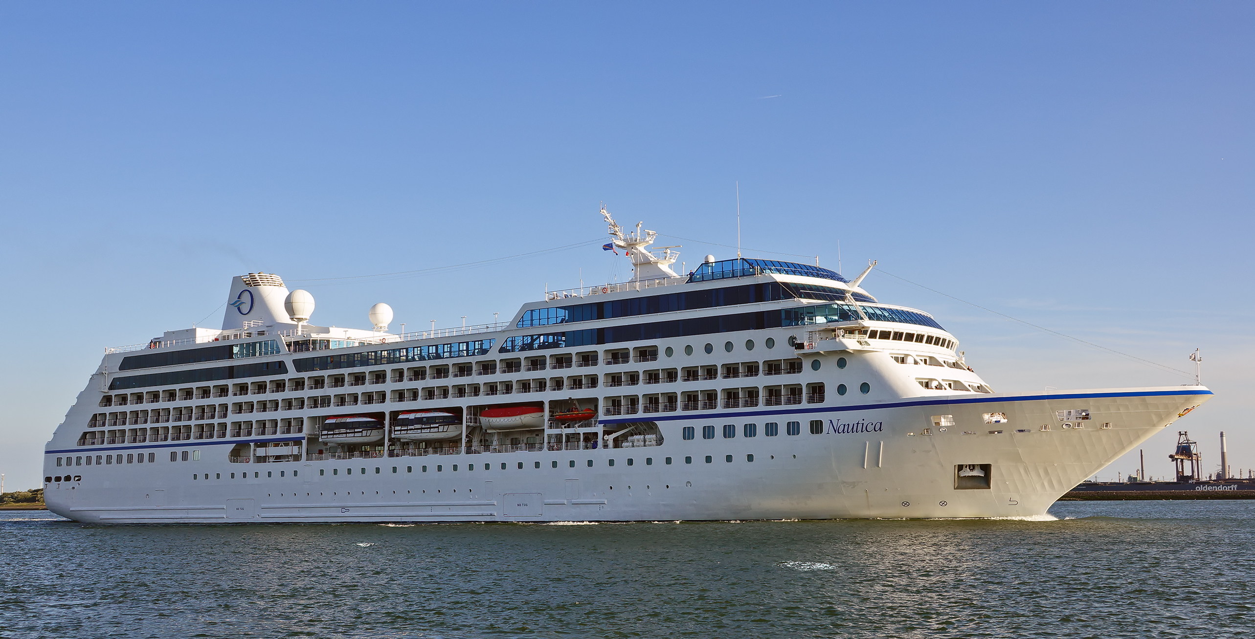 Nieuwe Waterweg 6-8-2017 , Nautica vertrok vanavond naar Aalborg Denemarken